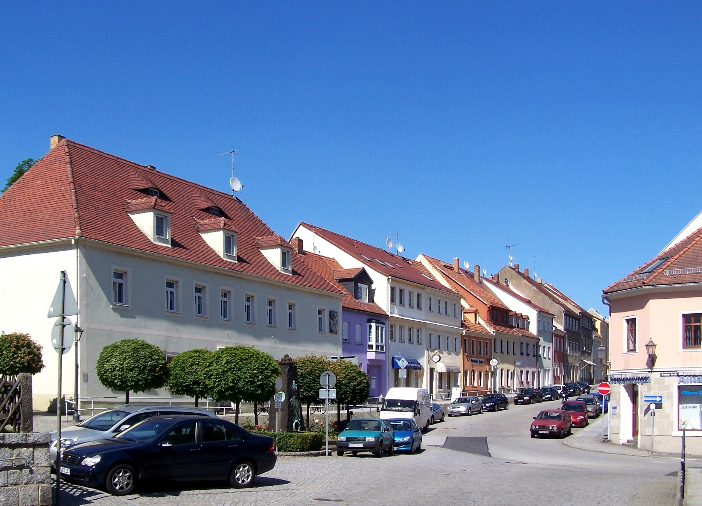 Blick in die Schloßstraße in Königsbrück, links das evangelische Pfarramt und das Kriegerdenkmal